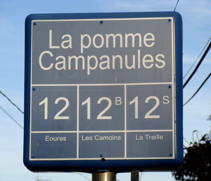 Panneau placé à un arrêt de bus sur la ligne des Camoins : les trois lignes ont un tronc commun jusqu'aux Quatre-Saisons, où la ligne 12s diverge ; la 12b est limitée aux Camoins, et la 12 continue jusqu'à Eoures.